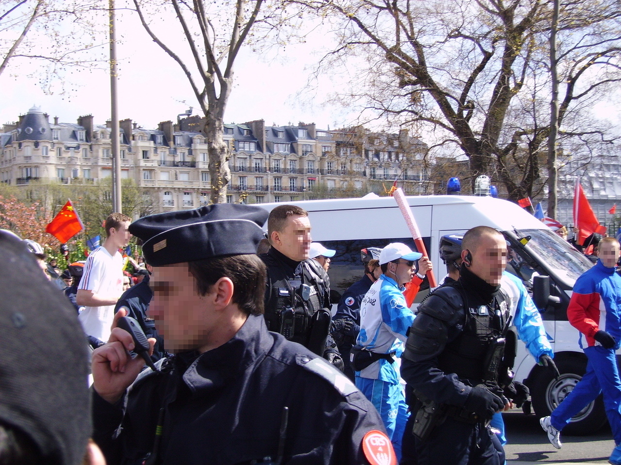 Relais de la flamme olympique, le 7 avril à Paris.